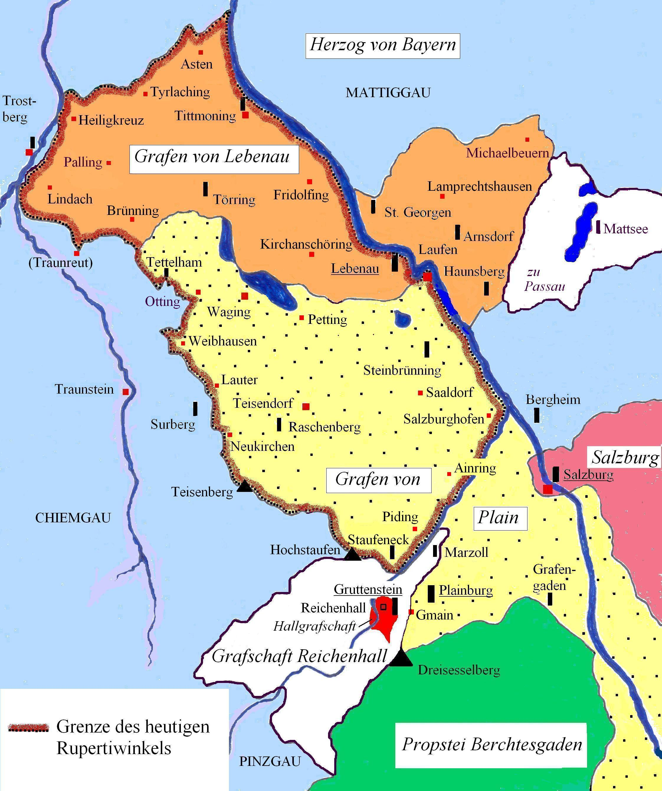 Herrschaftsgebiete im nördlichen Salzburggau im Hochmittelalter um 1200, etwa 1104 bis 1229 Die Karte wurde erstellt für den heimatkundlichen Beitrag Von Salzburg „retour nach Baiern“ - der Rupertiwinkel fiel vor 200 Jahren an das bayerische Königreich zurück, der in „Heimatblätter“ (Beilage von Reichenhaller Tagblatt und Freilassinger Anzeiger) am 25.09.2010 veröffentlicht wurde (pdf, heimatkundeverein-reichenhall.de).